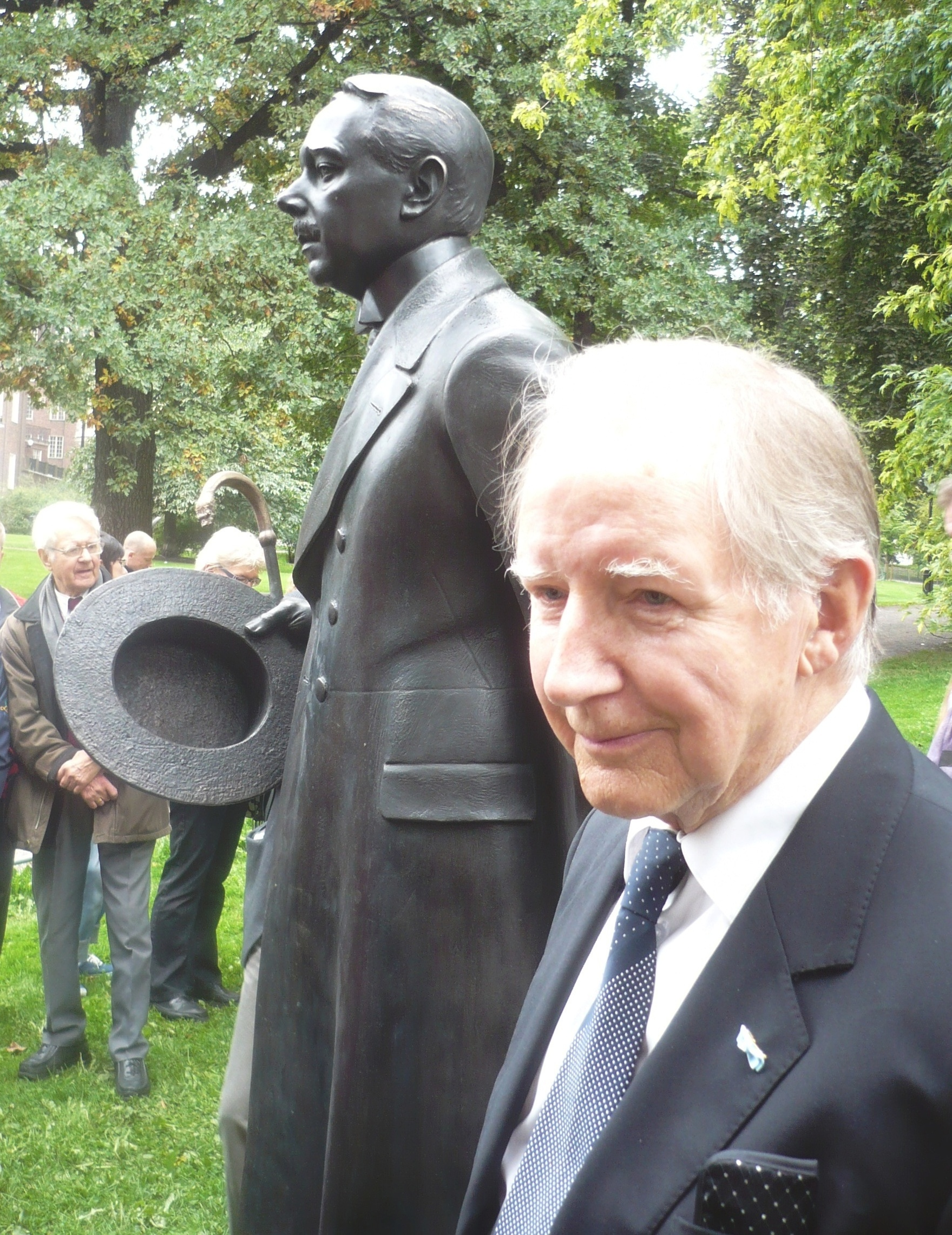 Kulturpersonligheten Bure Holmbäck vid avtäckningen av Hjalmar Söderberg-statyn framför Kungl. biblioteket i Humlegården den 11 september 2010.